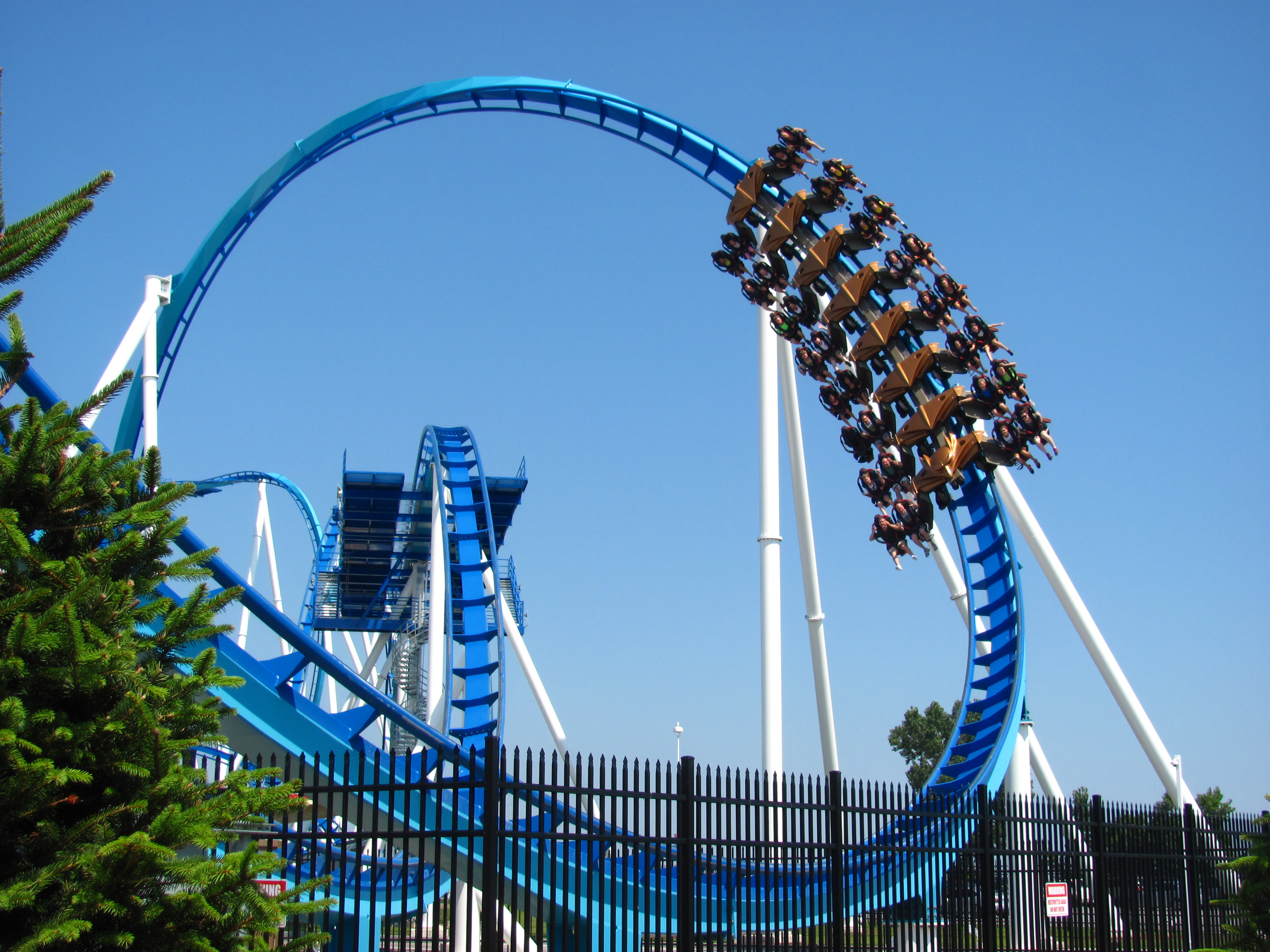 Cedar Point 012